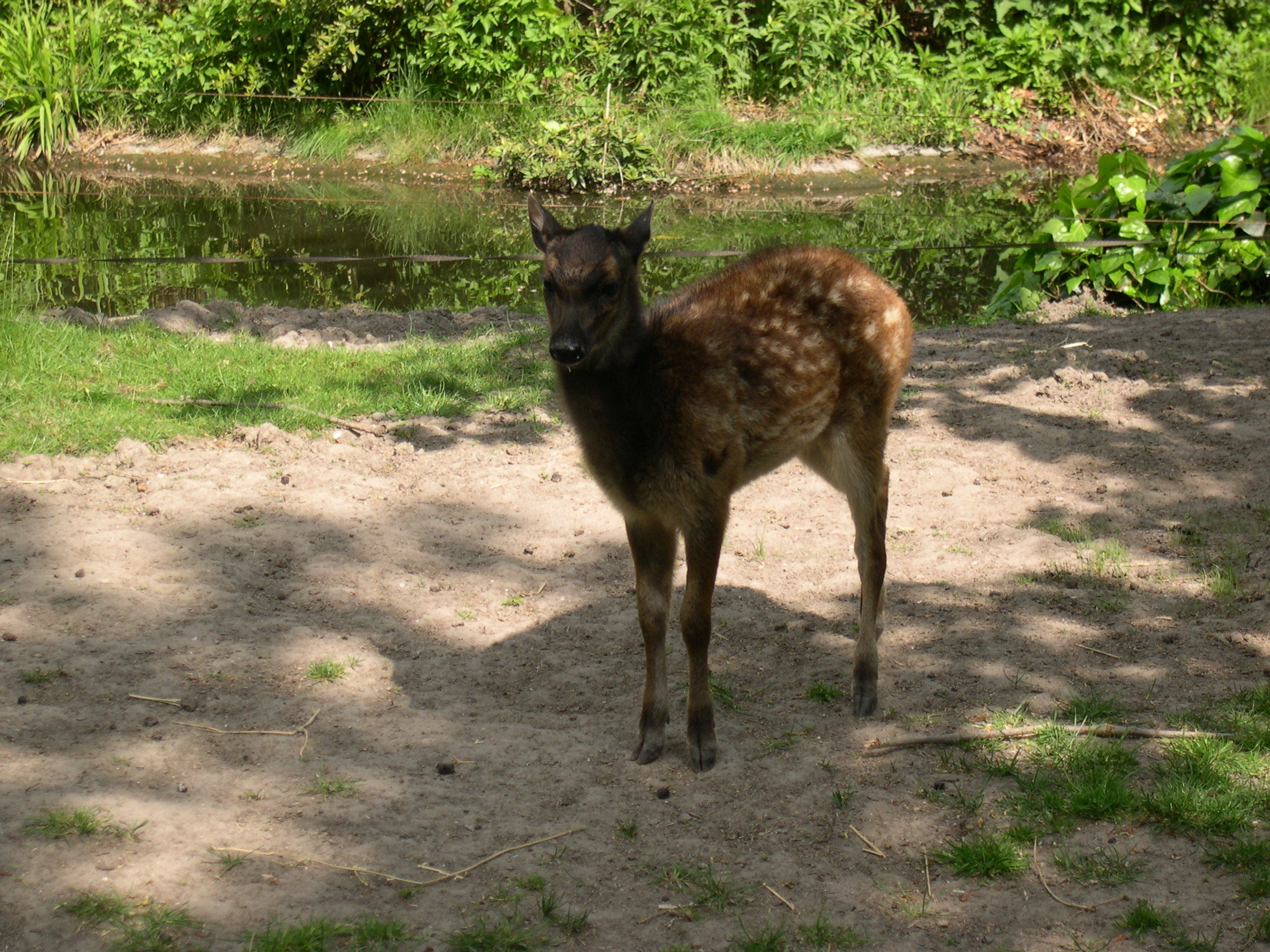 A young Visayan spotted deer (Cervus Alfredi) in Diergaarde Blijdorp (Rotterdam Zoo), Rotterdam, The Netherlands